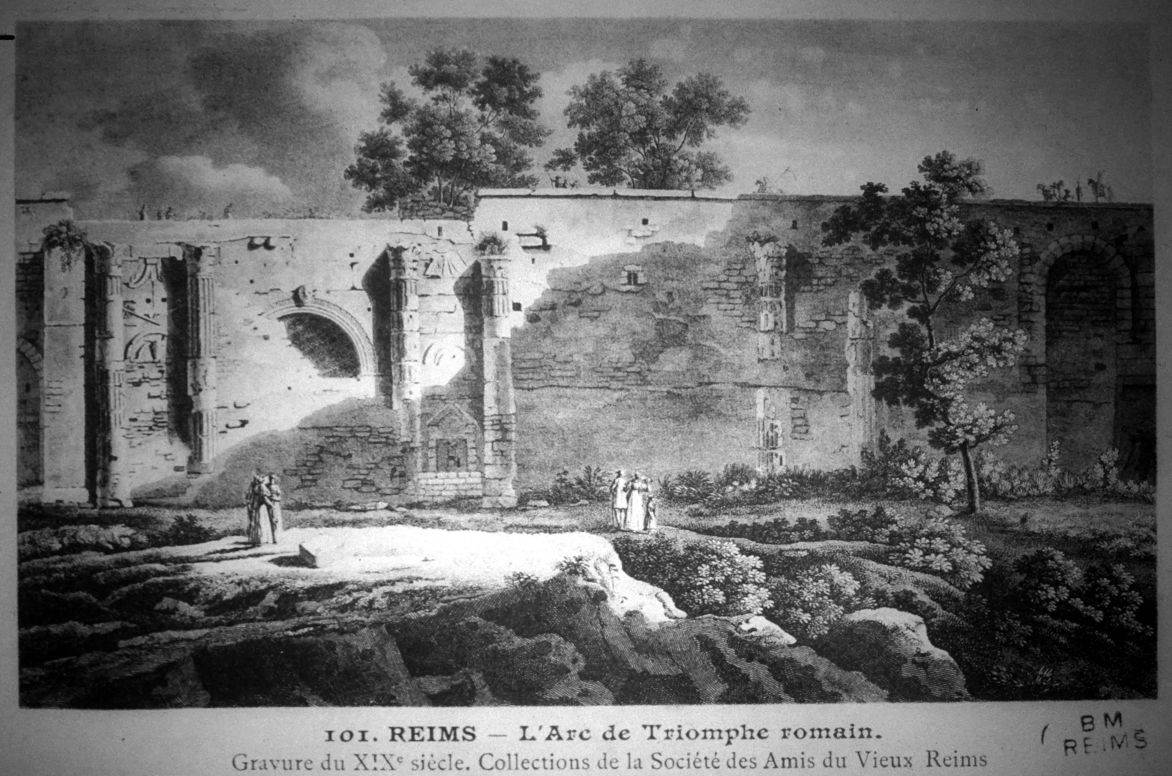 la porte mars encore enclavée dans l'enceinte de Reims.